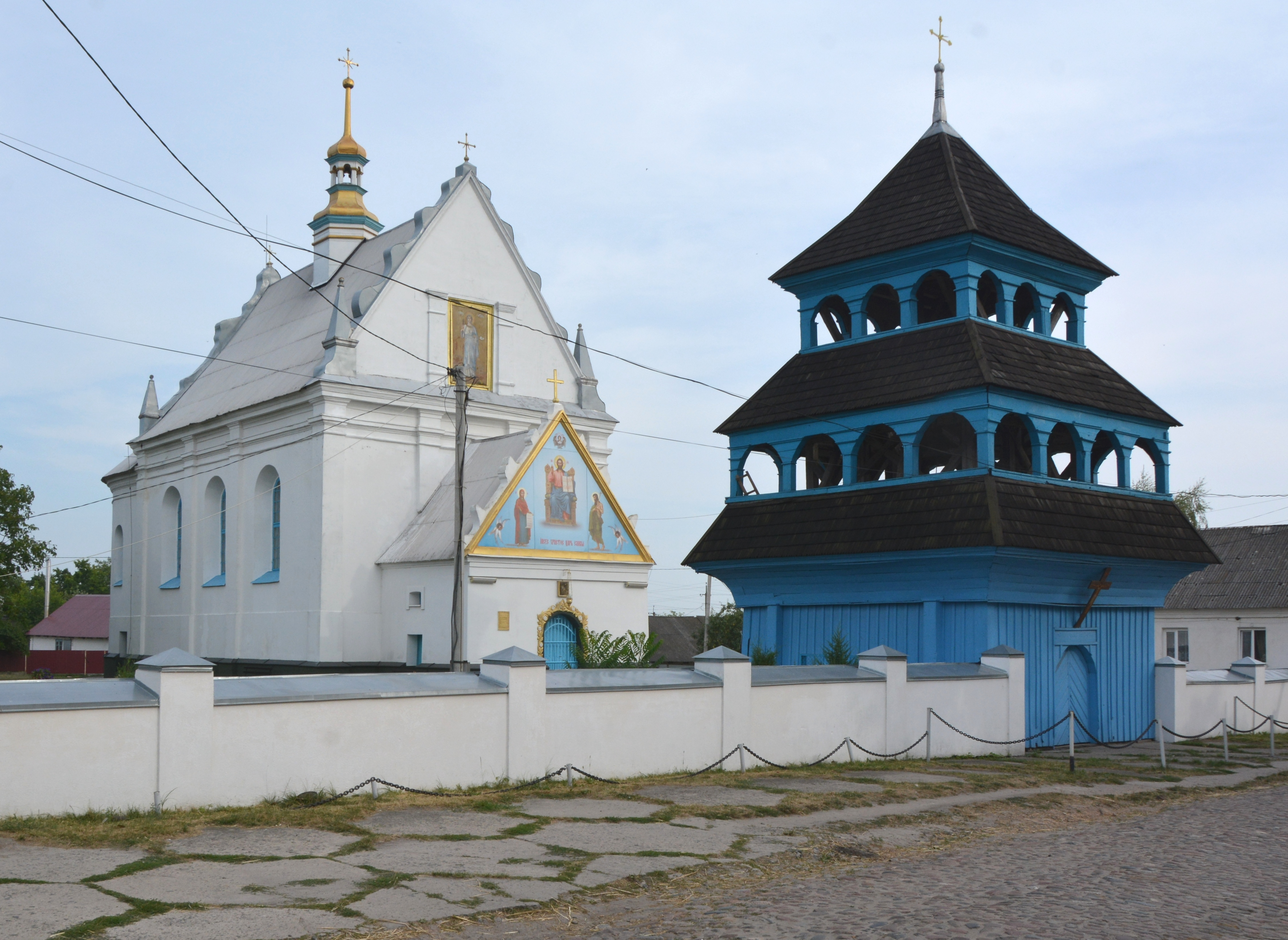 Дзвіниця церкви Св. Параскеви (дер.), Луків